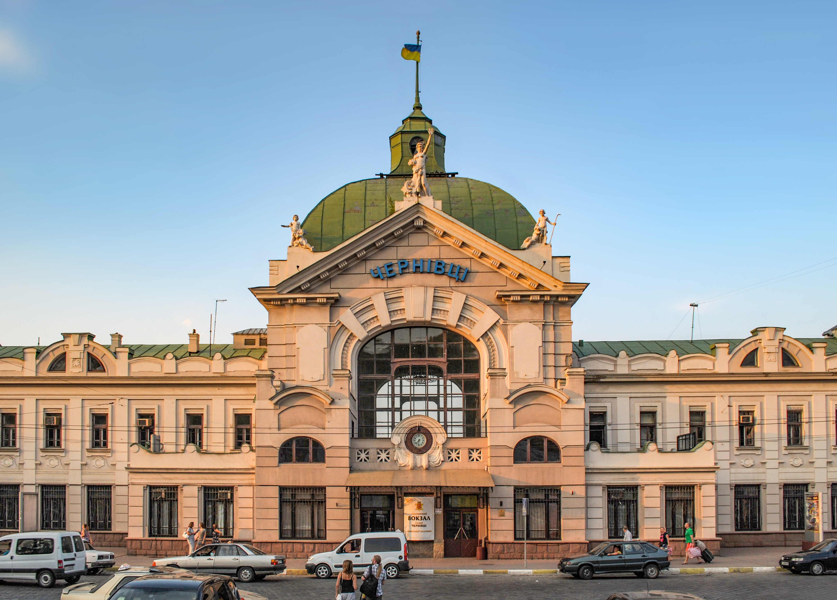 Залізничний вокзал, Чернівці, Гагаріна Юрія, 38